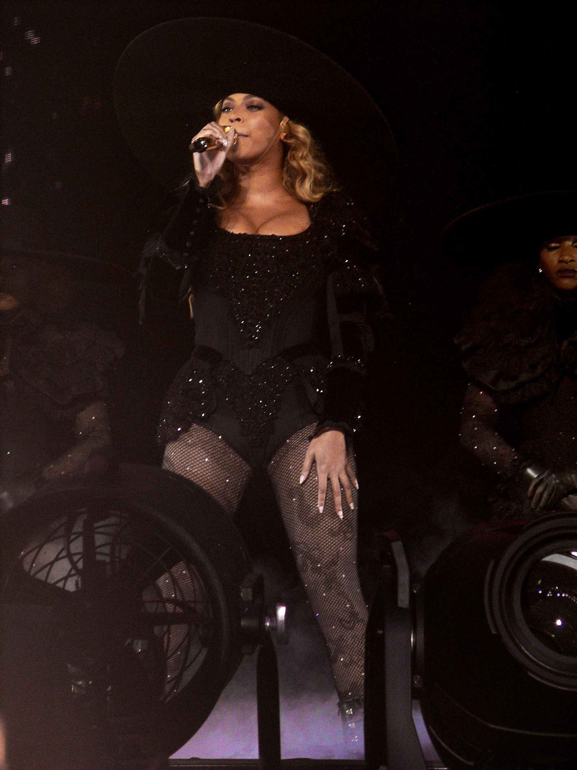 Beyonce durante un show en el estadio San Siro en Milan